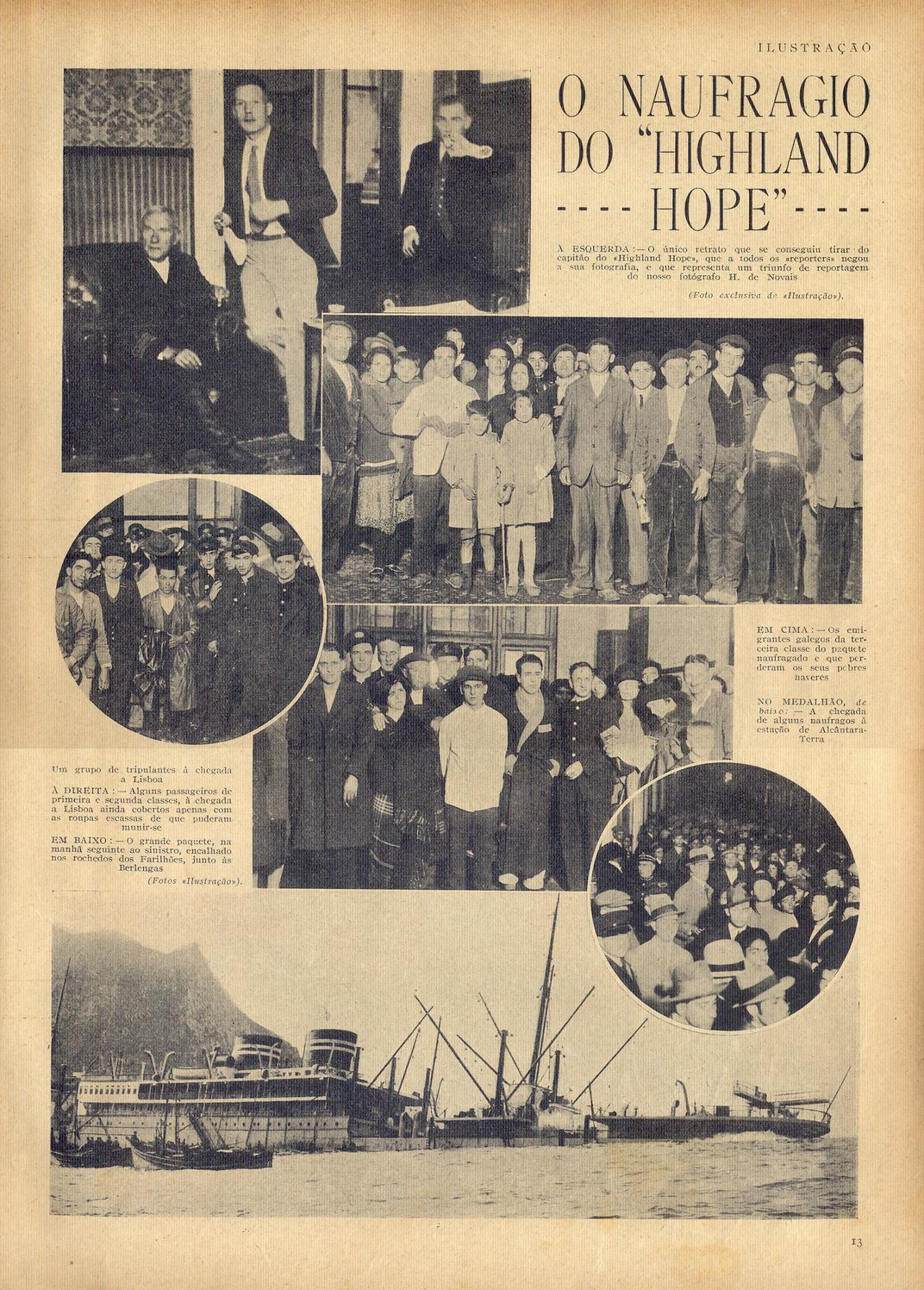 Naufrages das les Berlengas